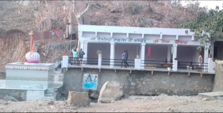 देवनिया महादेव मंदिर, सकालदा